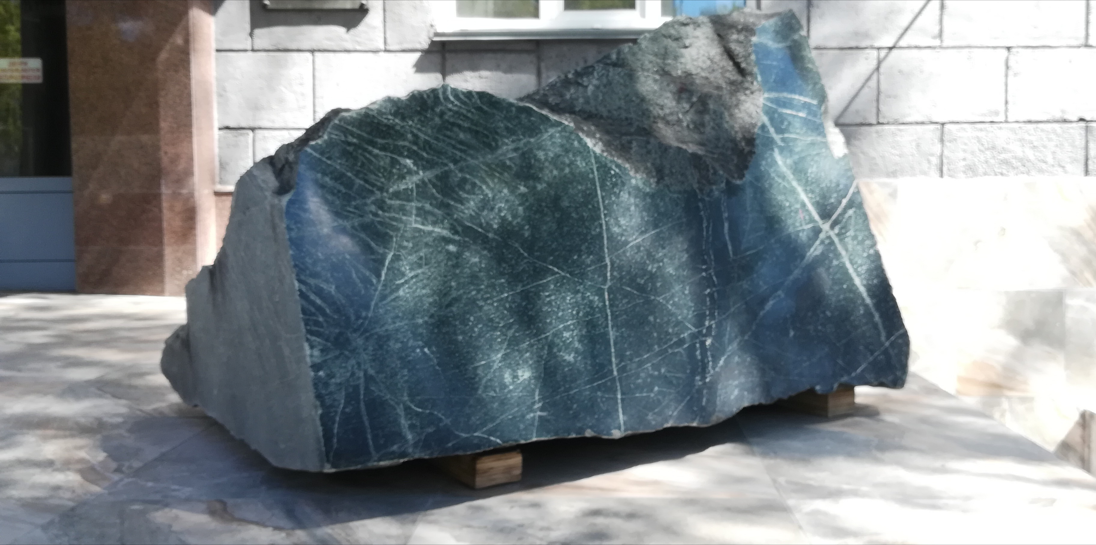 Новосибирск